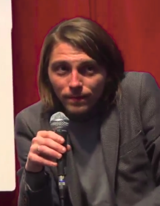 22 de marzo de 2018. Arden las redes: Posverdad, cipotudos, troles y lo que surja Juan Soto Ivars. Sofía Castañón